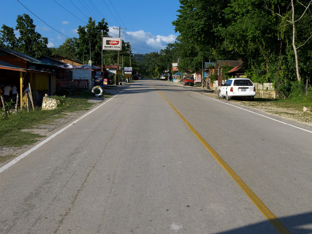 El Remate